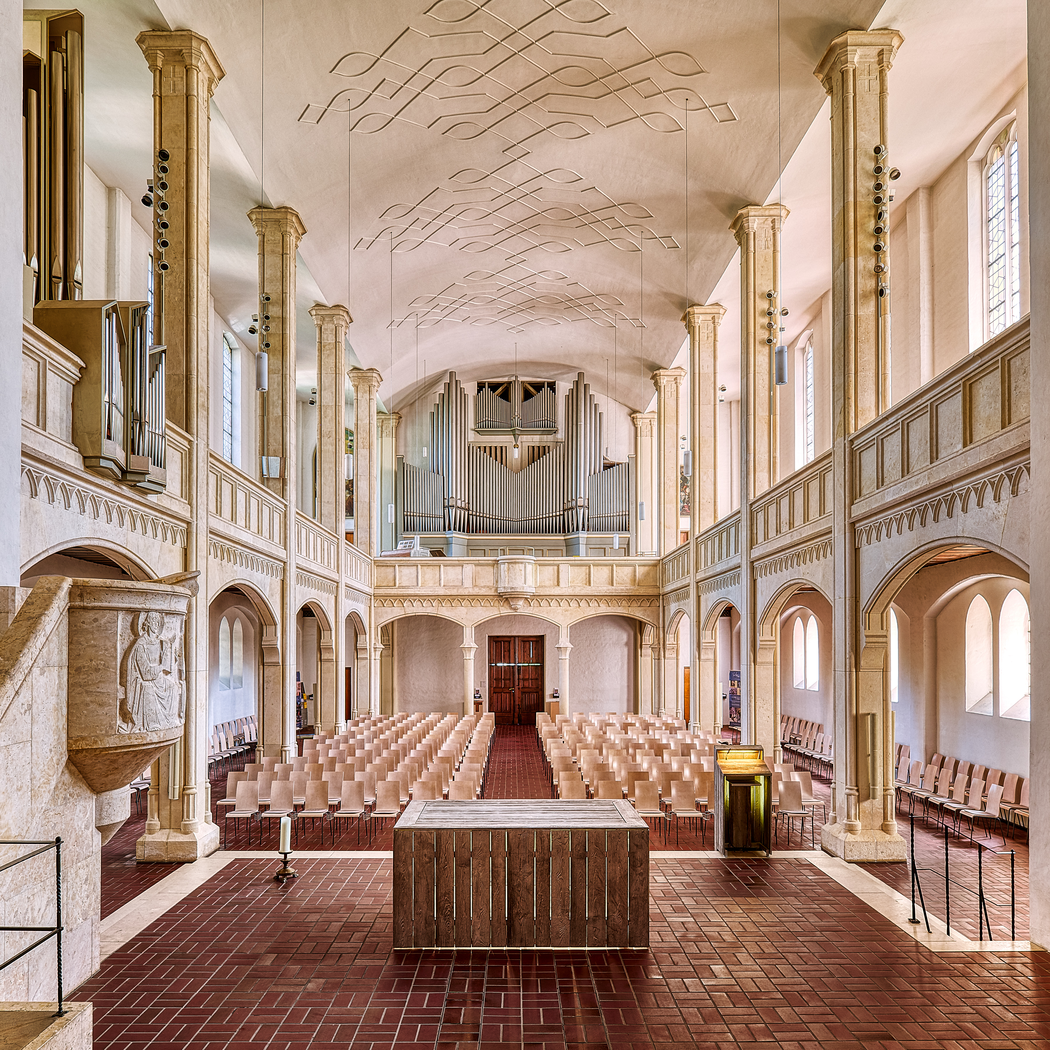 Durch Um- und Wiederaufbauten klassisch moderne Kirche, ursprünglich neugotisch. Blick vom Altar über den Kirchenraum. Dekanatskirche. Musik-, Kunst und Universitätskirche.This is a photograph of an architectural monument.